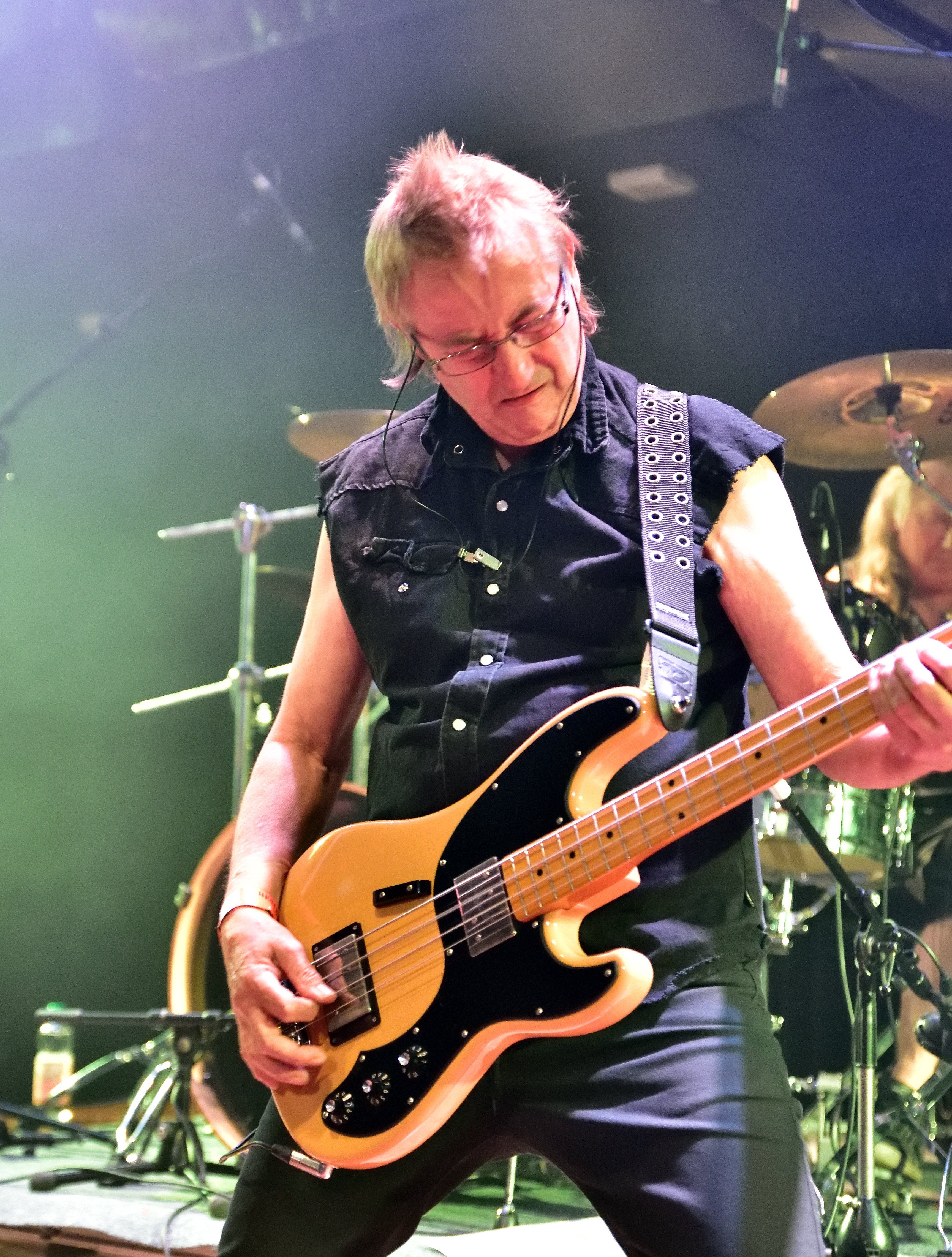 Picture beim Heathen Rock Festival